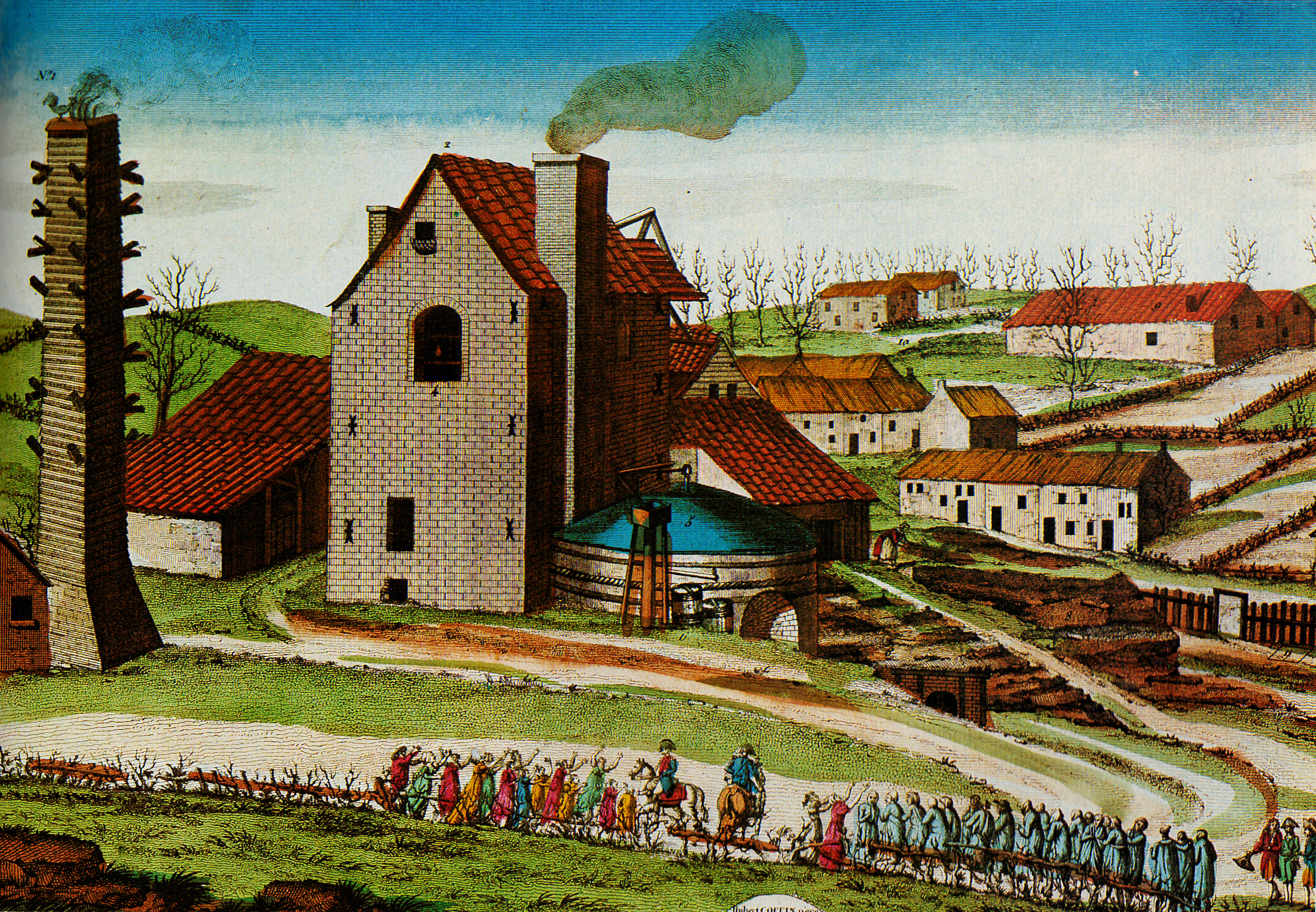 La mine Beaujonc près de Liège, le 4 mars 1812. B. Melchior-Bonnet, p. 255 : « à gauche, une cheminée d'aération ; au centre, un petit bâtiment à un étage contenant la pompe à feu, précédé d'une rotonde abritant la chaudière à vapeur ; à droite, l'entrée de la mine [...]. ».